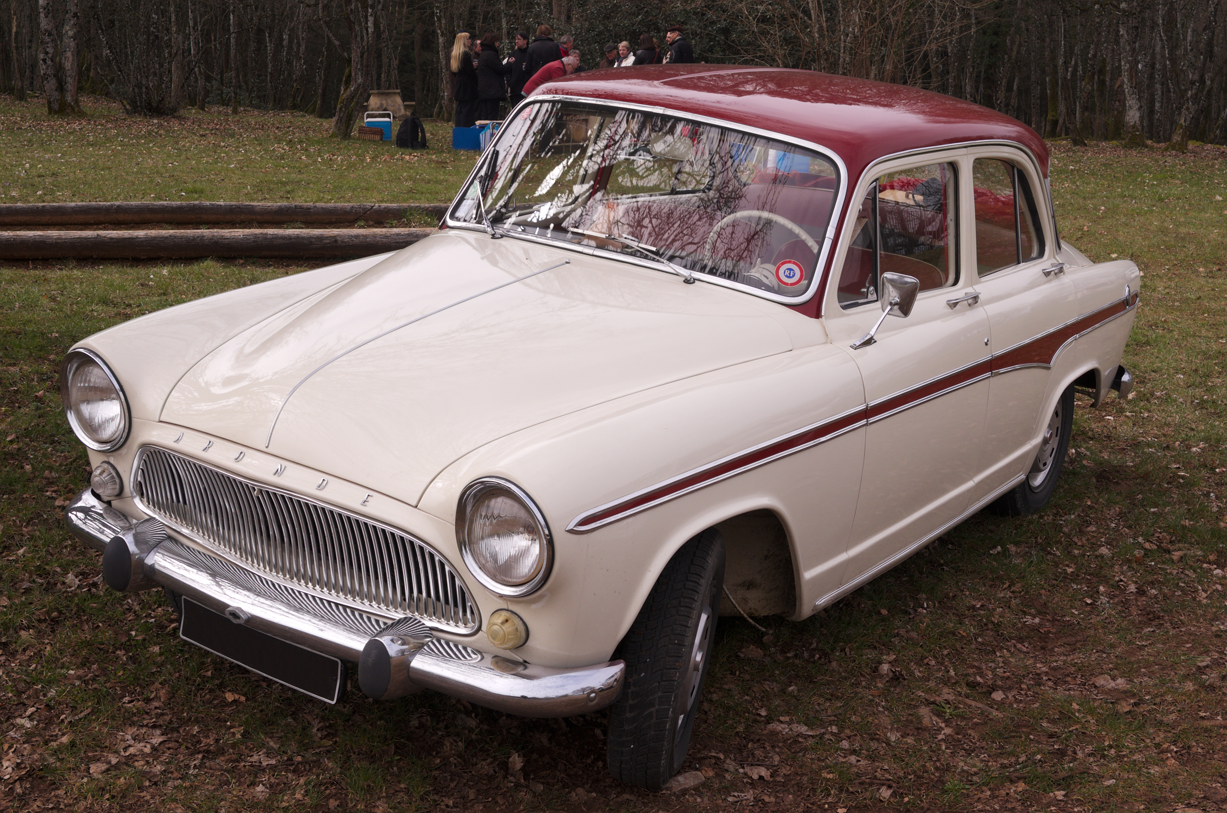 Sortie Soupapes dégrippées 07-04-2013 - Simca Aronde